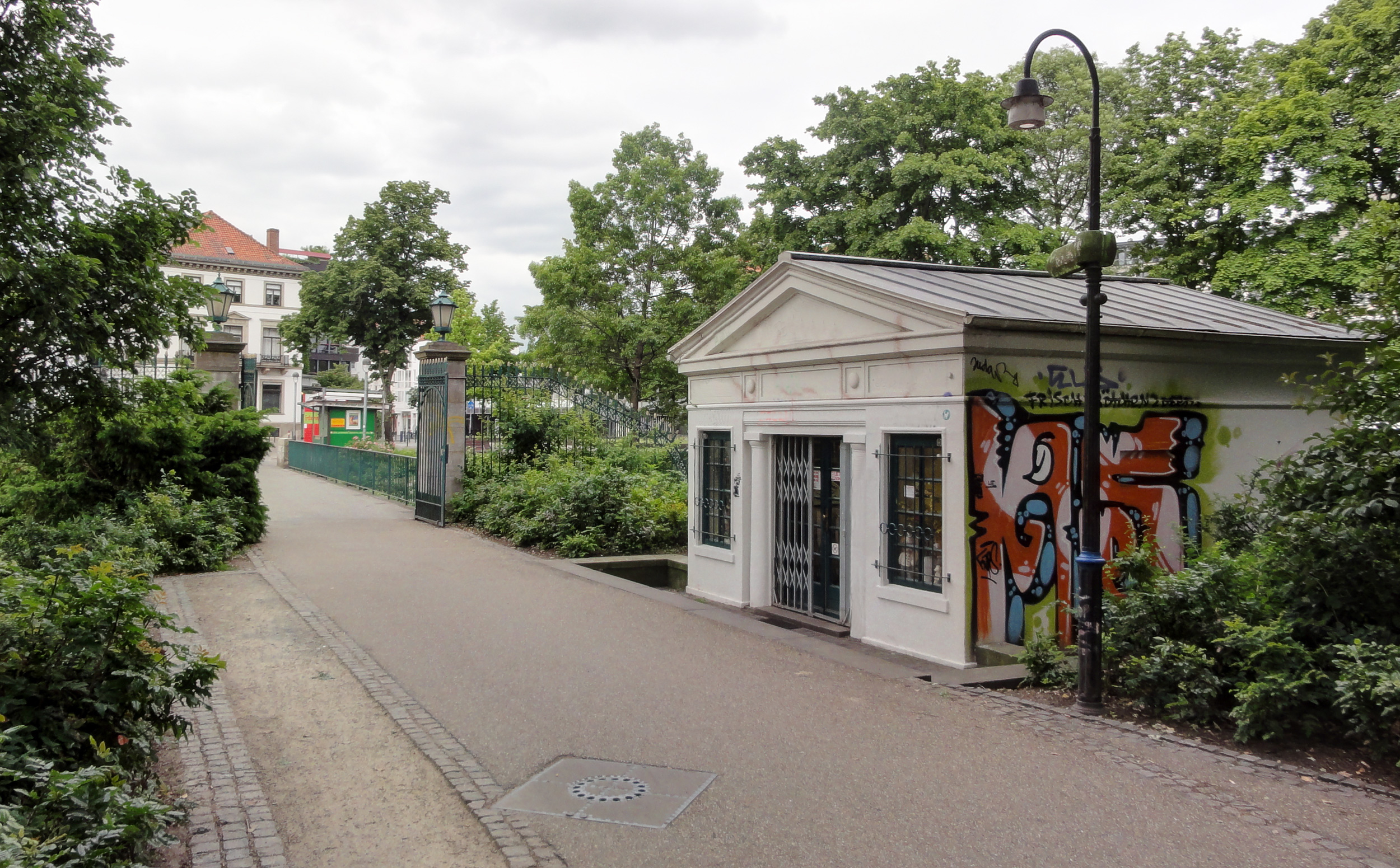 Bischofstor in Bremen, WallanlagenDas abgebildete Objekt ist ein geschütztes Kulturdenkmal in der Freien Hansestadt Bremen, mit der Nr. 1193,T006 beim Landesamt für Denkmalpflege registriert.